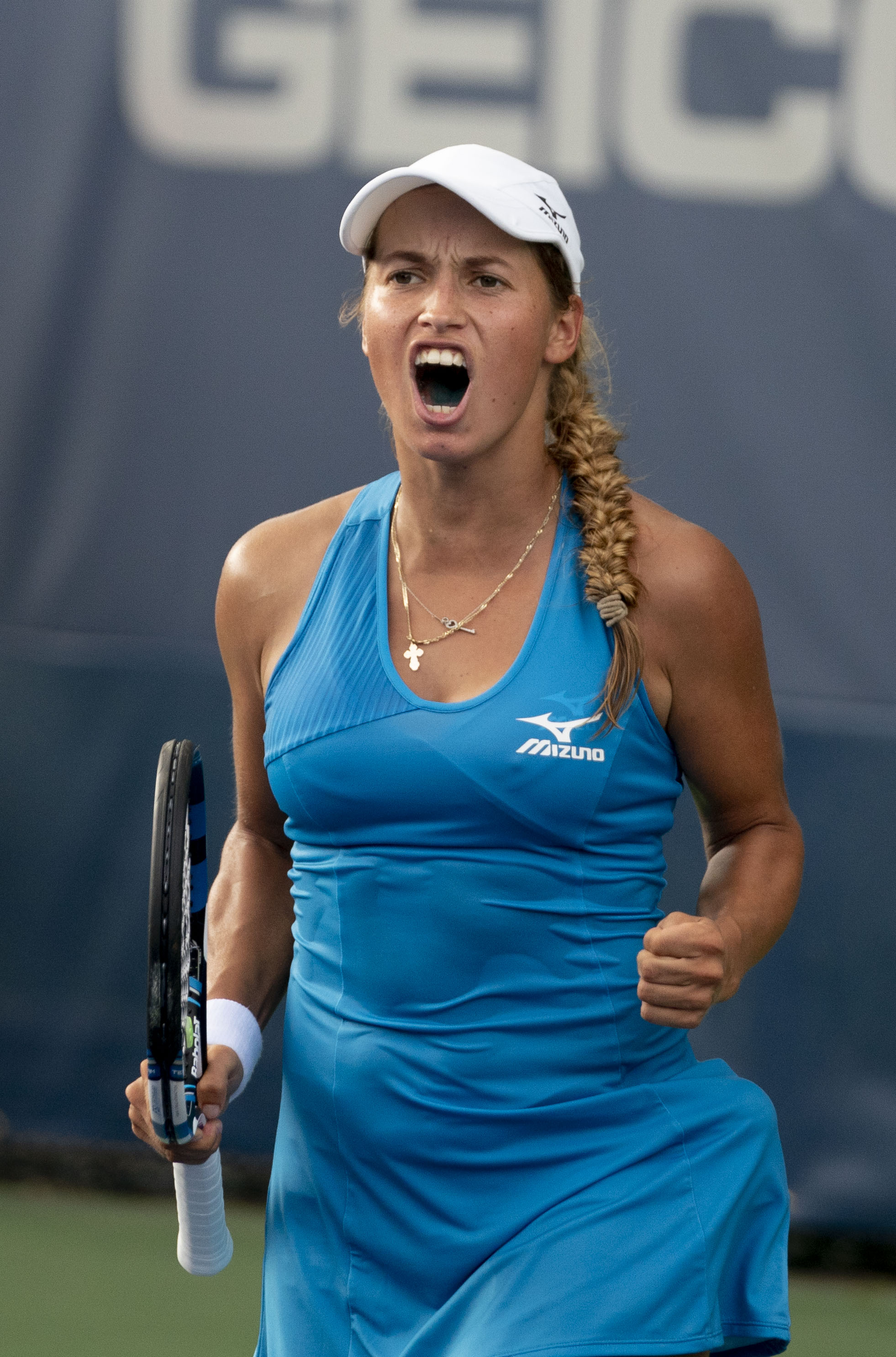 2018 Citi Open Tennis